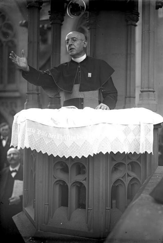 Hildegradesfest am Mittel-Rhein ! Anlässlich des 750. Todestages der heiligen Hildegard von Bingen, fand unter Teilnahme von Prälat Dr. Seipel, Reichskanzler a.D. Dr. Wirth und anderen hohen kirchlichen Würdenträger eine feierliche Prozession in Bingen a/Rhein statt. Prälat Dr. Seipel spricht vor der Hildegardes-Kapelle in Bingen.